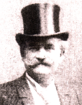 Portrét Pétera Jakaba